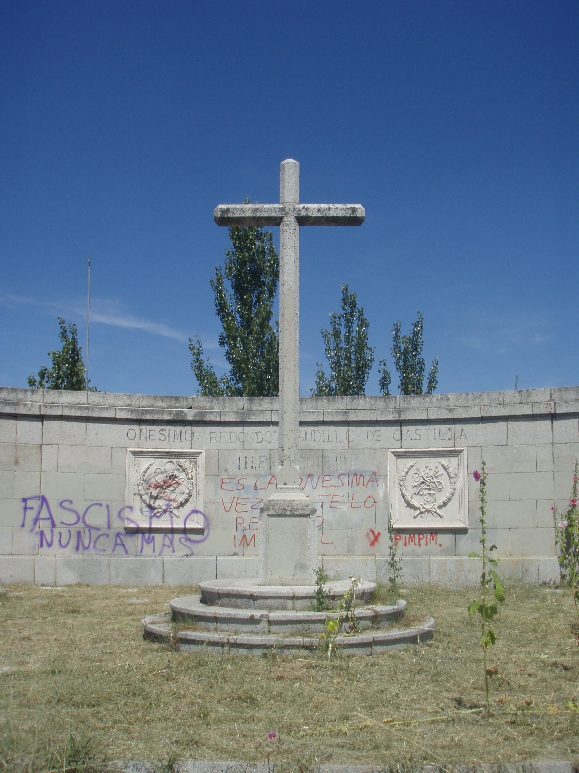 Monumento erigido en el pueblo segoviano de Labajos a Onésimo Redondo, dirigente de la JONS abatido en dicha localidad el 24 de julio de 1936 a manos de un grupo de milicianos republicanos.